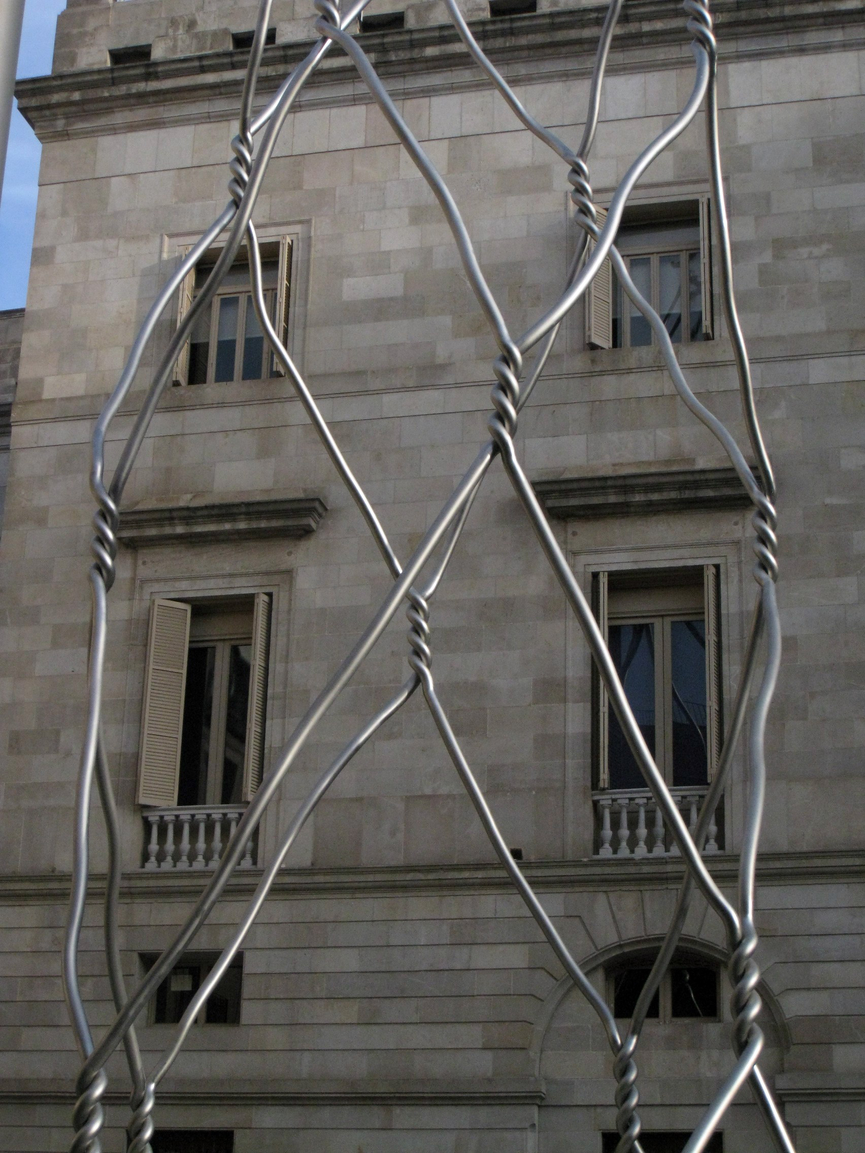 Monument als Castellers, al fons l'ajuntament de Barcelona